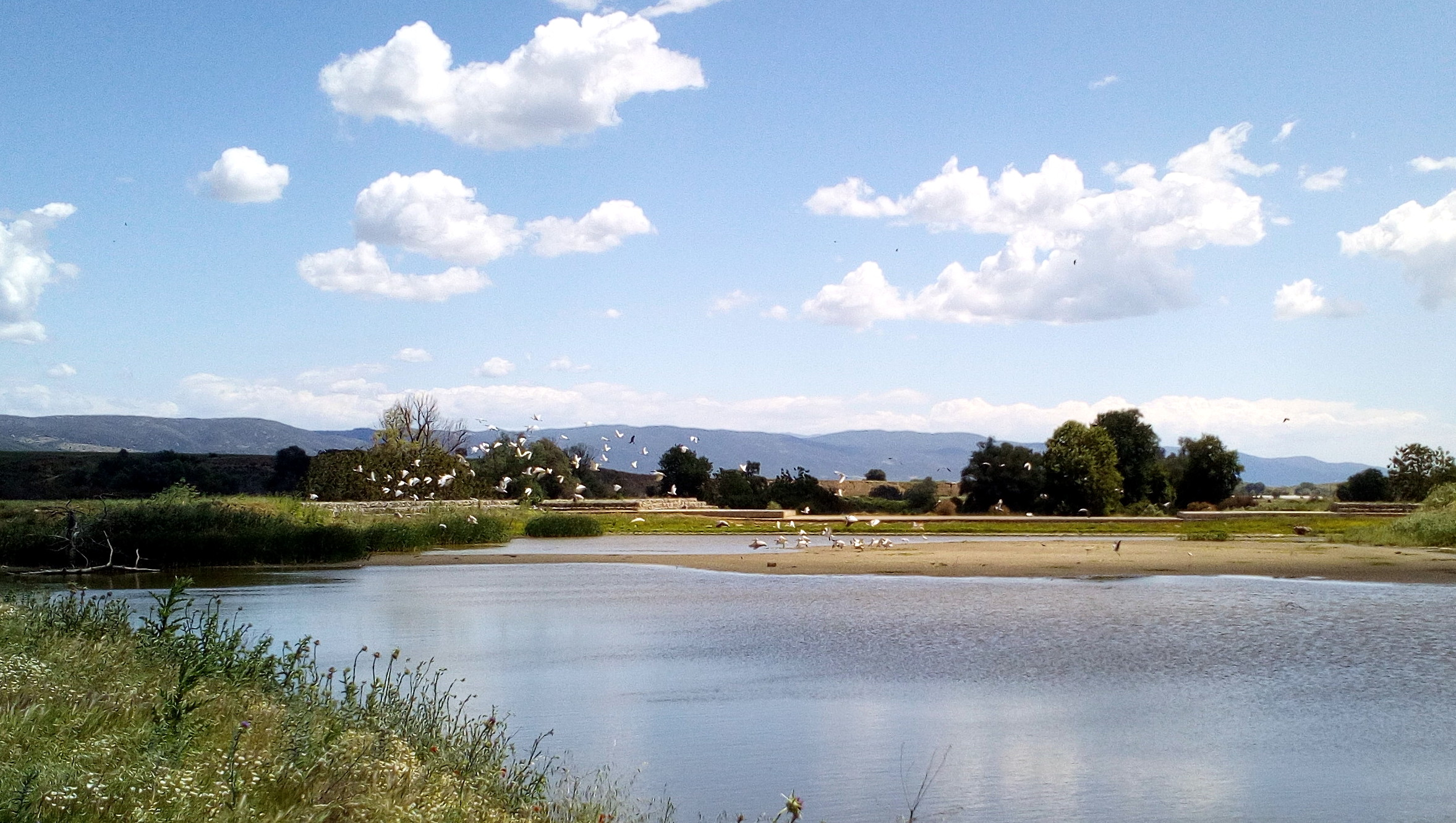 Μικρή τεχνητή λιμνούλα ανάμεσα στην λίμνη Κορώνεια και την λίμνη Βόλβη. This is a photography of Natura 2000 protected area with ID GR1220001